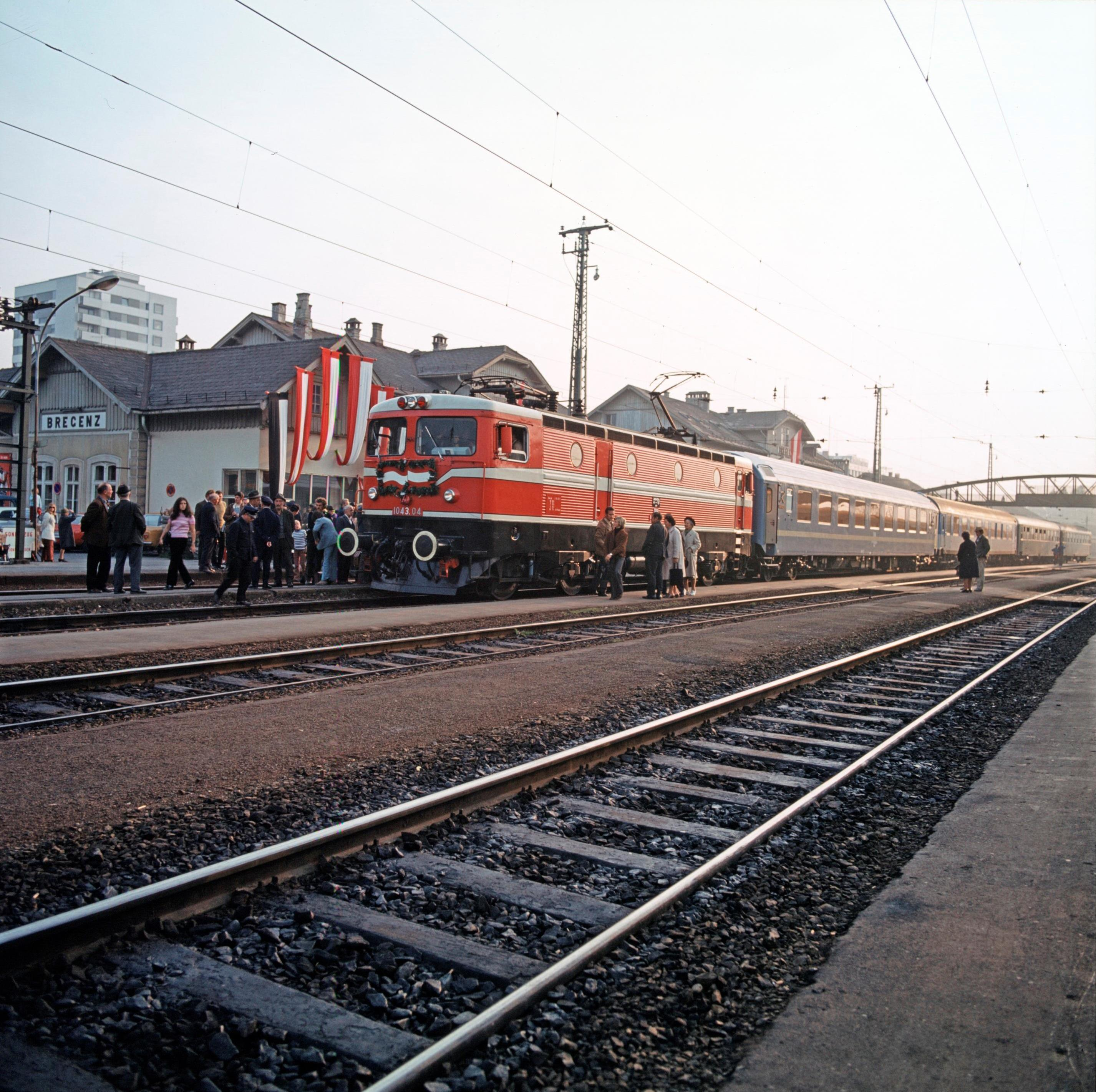 Festzug anlässlich des Jubiläums "100 Jahre Vorarlberger Bahn" im Bahnhof Bregenz im Jahr 1972.